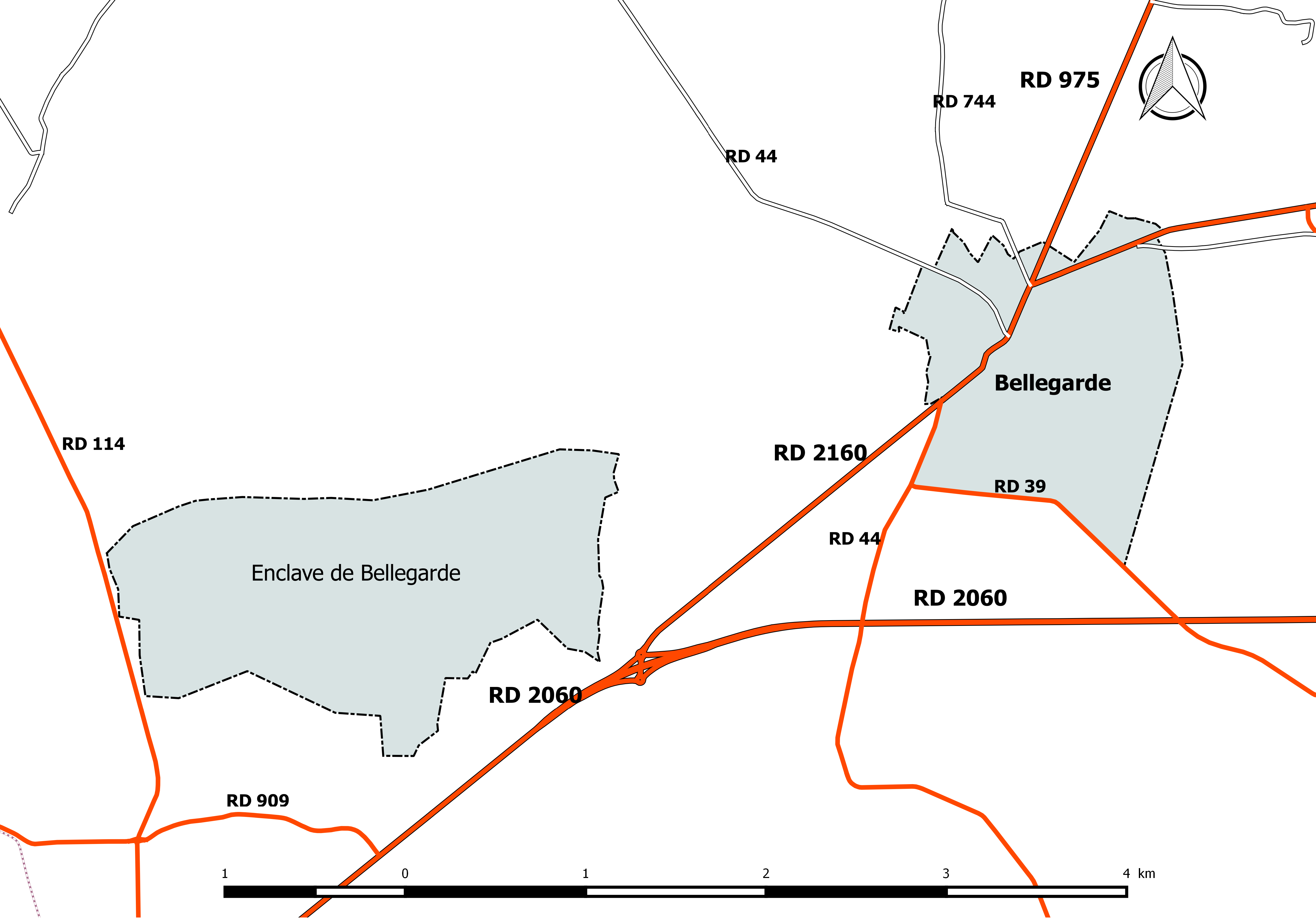 Carte du réseau routier de la commune de Bellegarde (Loiret).